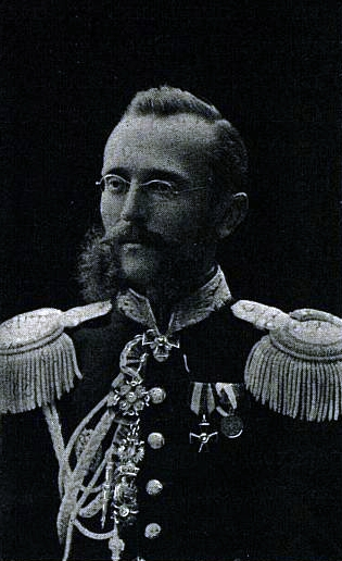 Полковник Газенкампф Михаил Александрович